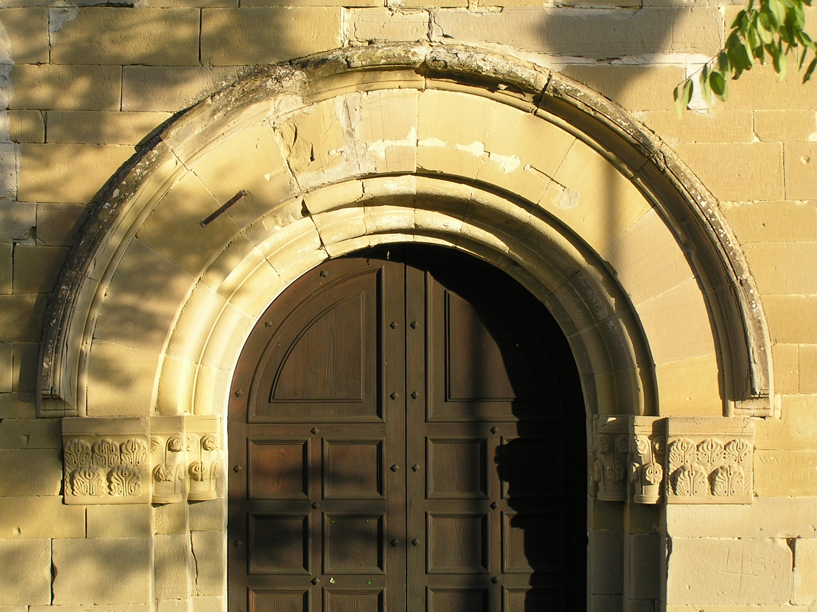 Portale romanico della chiesa di Santa Maria del Pantano, coi capitelli e il cornicione ancora perfettamente conservati.